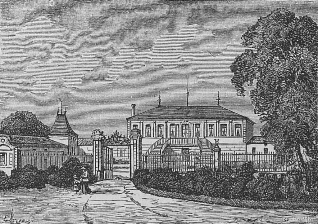 Illustration du Château La Lagune dans l'ouvrage Bordeaux et ses vins (6ème édition) de Charles Cocks et Edouard Féret publié en 1893